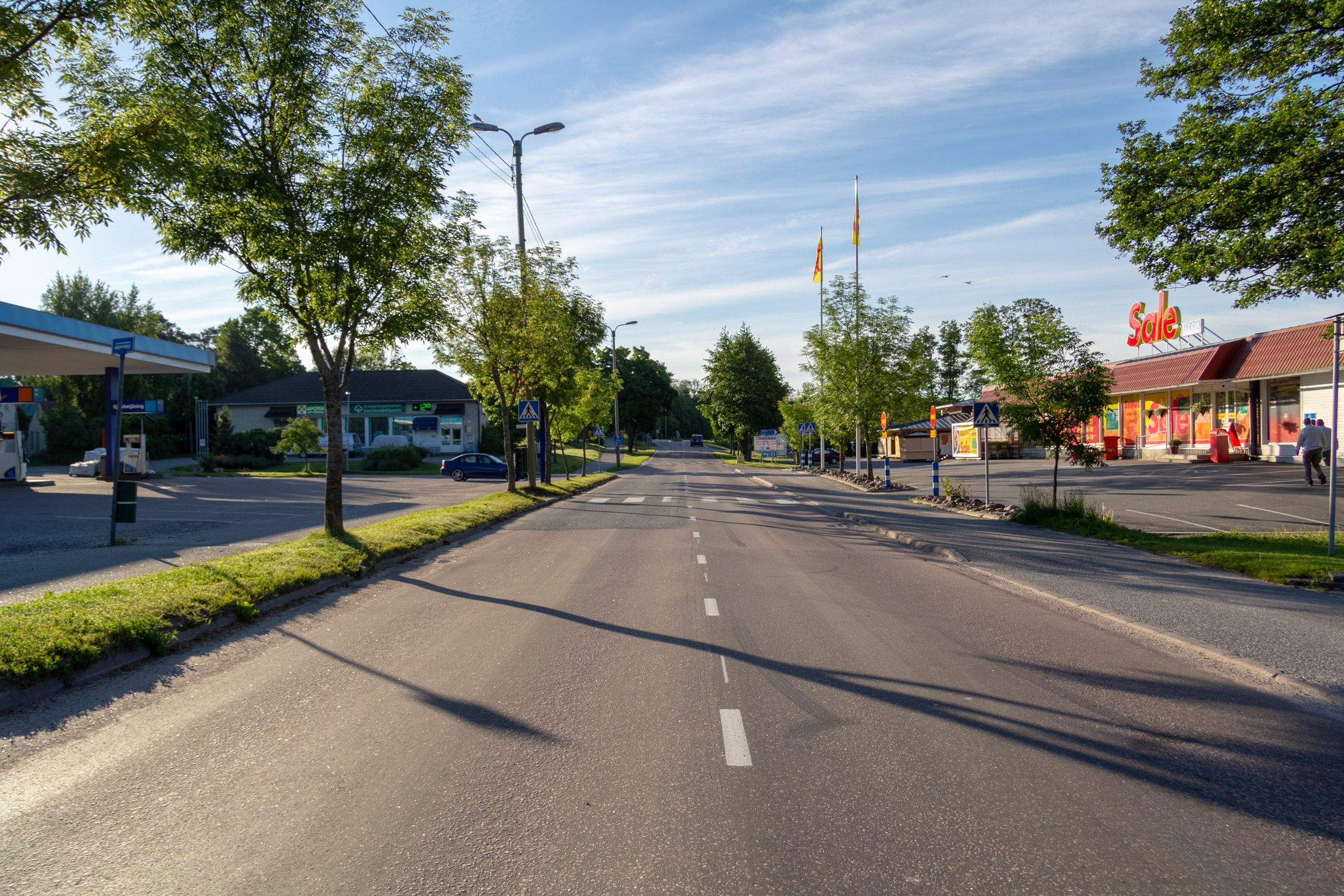 Skärgårdsvägen 180, Nagu centrum